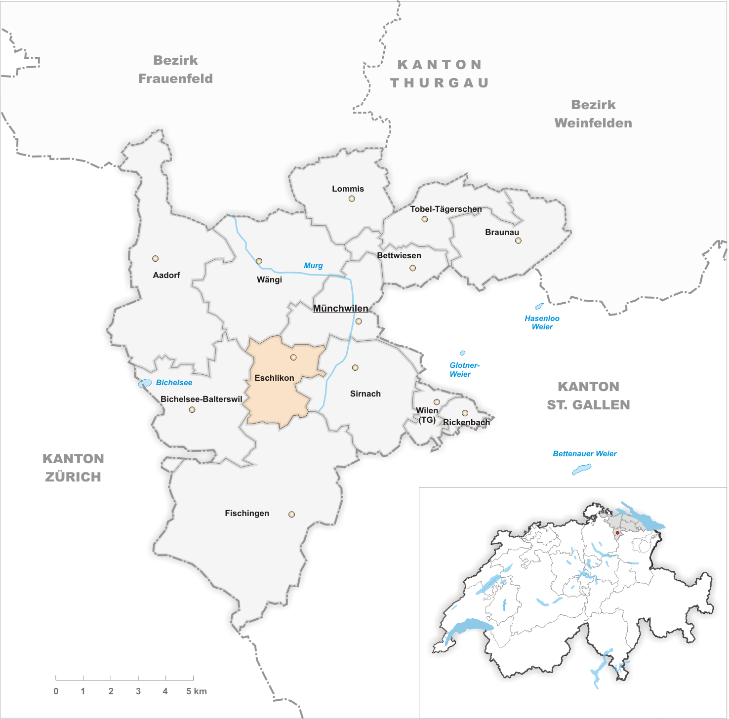 Municipality Eschlikon